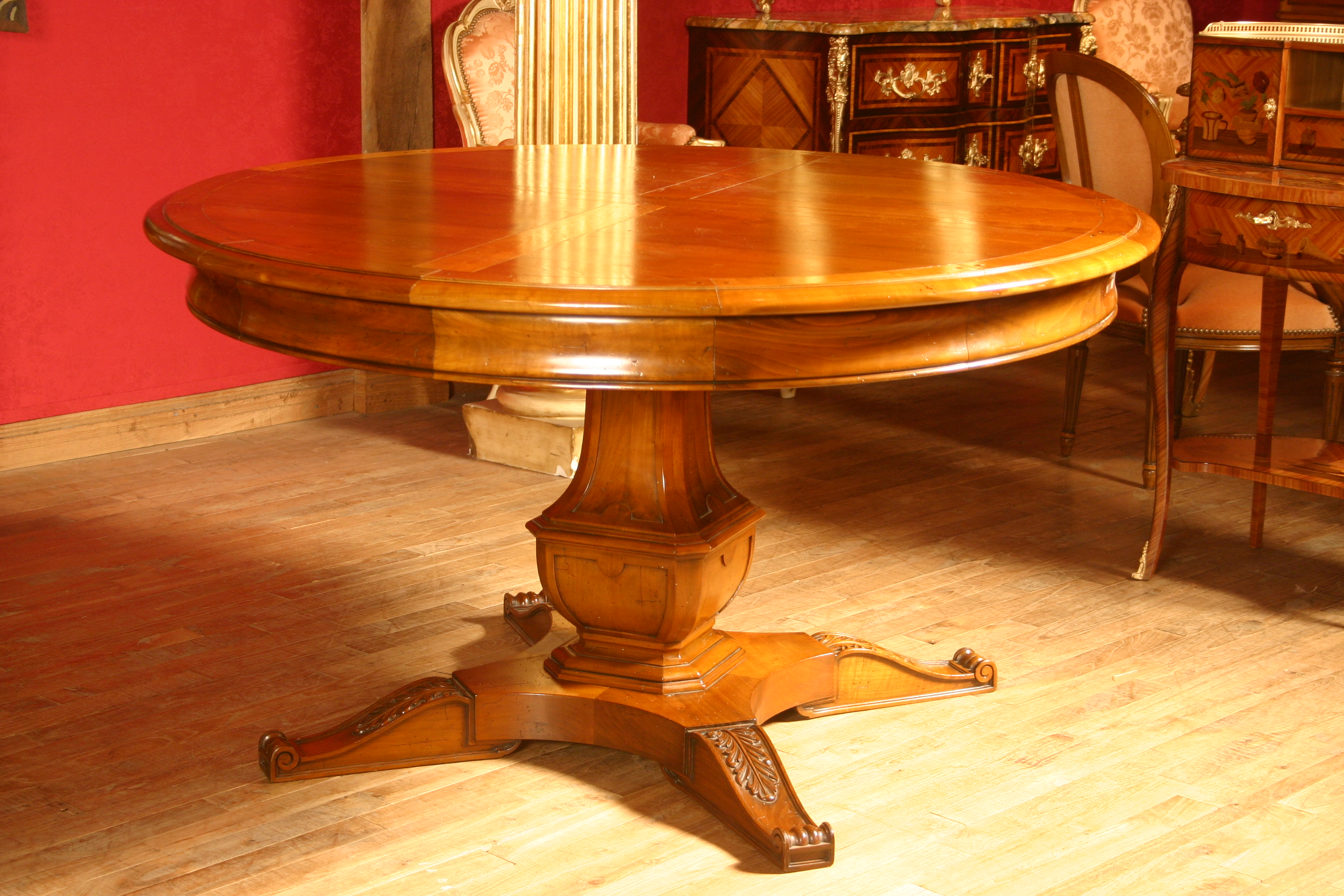 Table de style fin Louis XIV "Colbert" début Régence, reconstituée d'après une esquisse d'un tableau d'époque, réalisé par les Ateliers Allot Frères